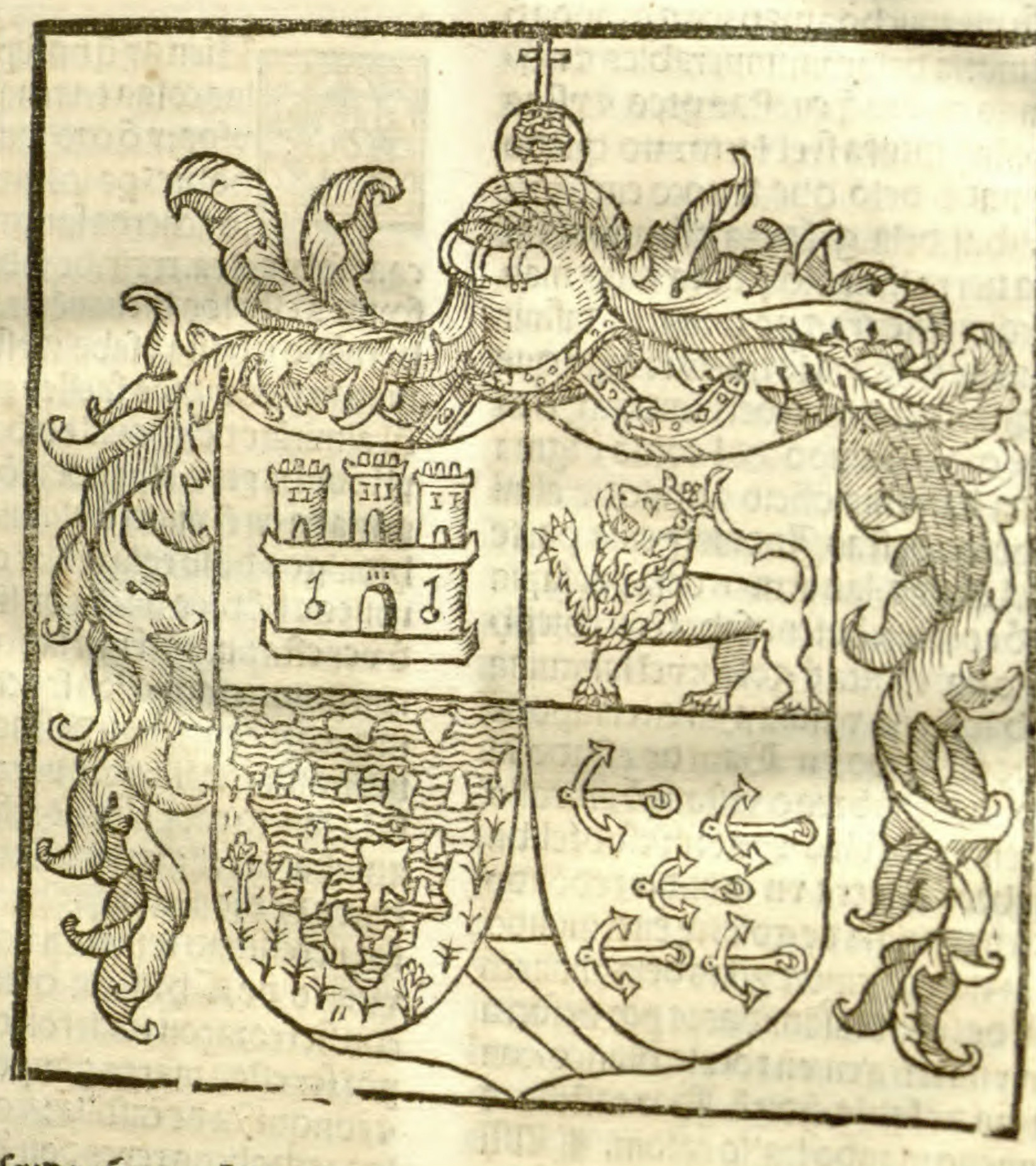 Escudo de armas del Almirante Cristobal Colon (2)